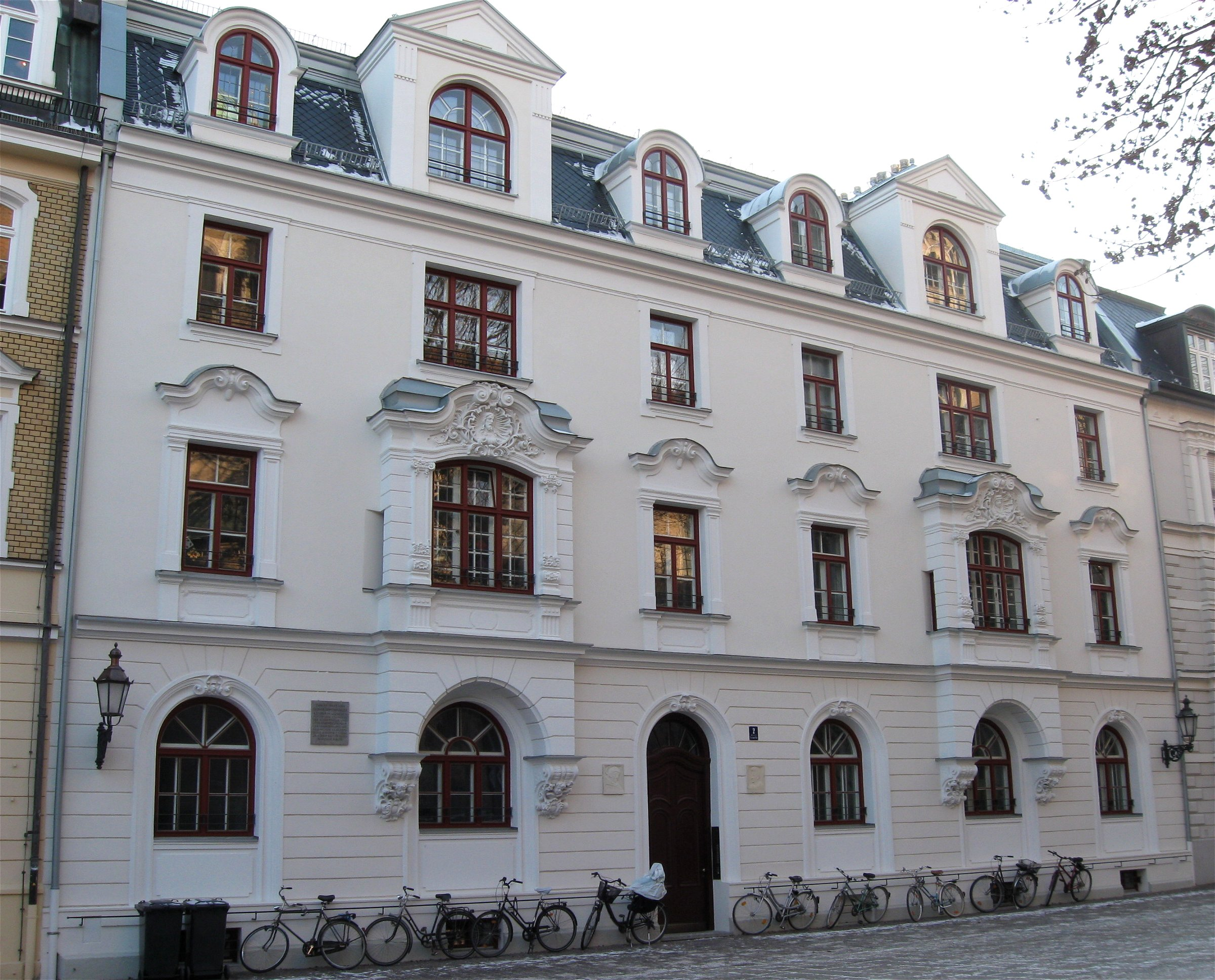 St.-Anna-Platz 2; Mietshaus, neubarocke Doppelerkerfassade, reich dekoriert, 1887 von Ludwig Marckert und Gabriel von Seidl (Fassadenentwurf)